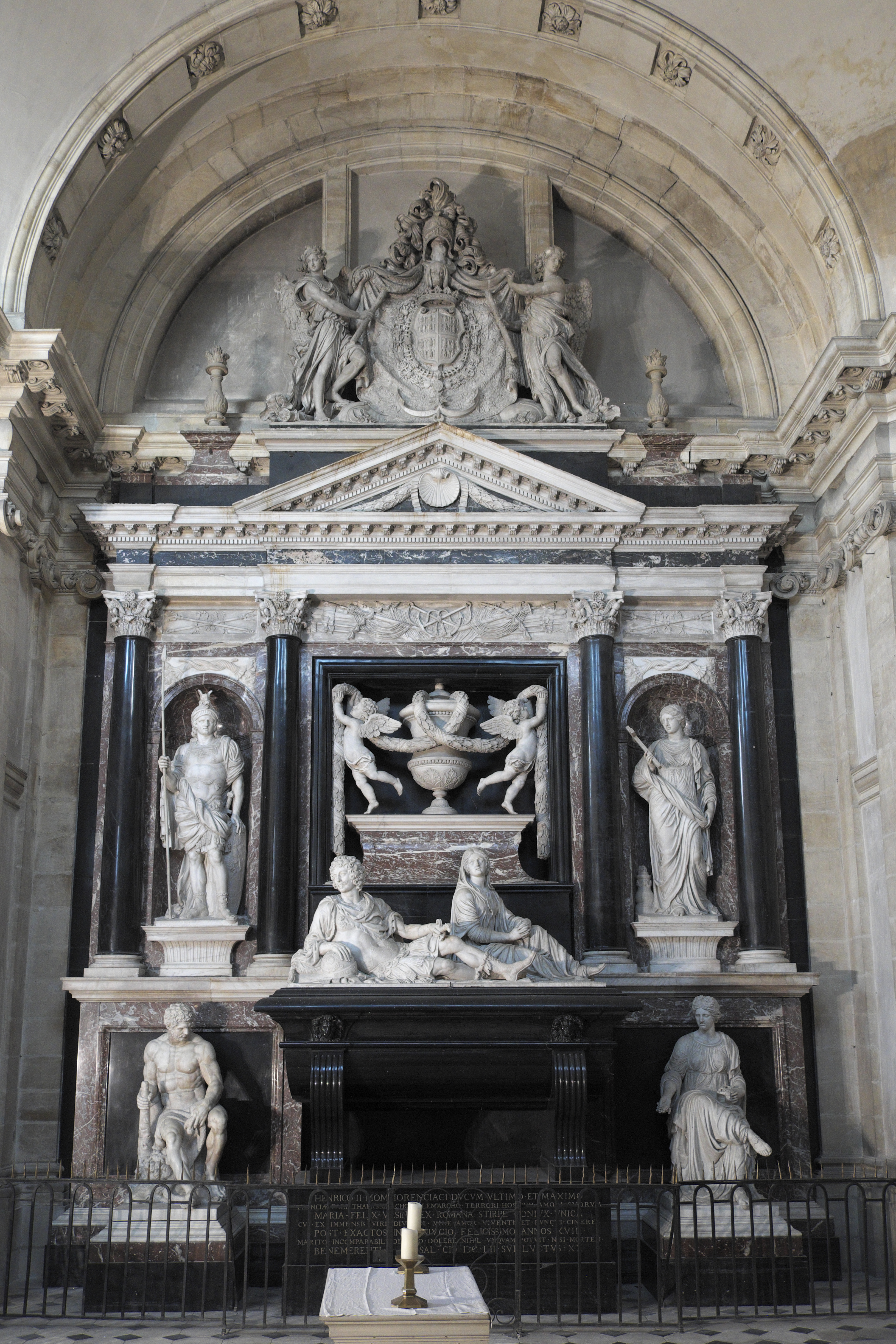 Kapelle Saint-Joseph, ehemalige Kapelle des Ordens von der Heimsuchung Mariens (Chapelle de la Visitation) in Moulins im Département Allier (Auvergne-Rhône-Alpes/Frankreich), Grabmal für Henri II. de Montmorency, 1649/52 von den Bildhauern Michel und François Anguier, Thibault Poissant und Thomas Regnaudin geschaffen